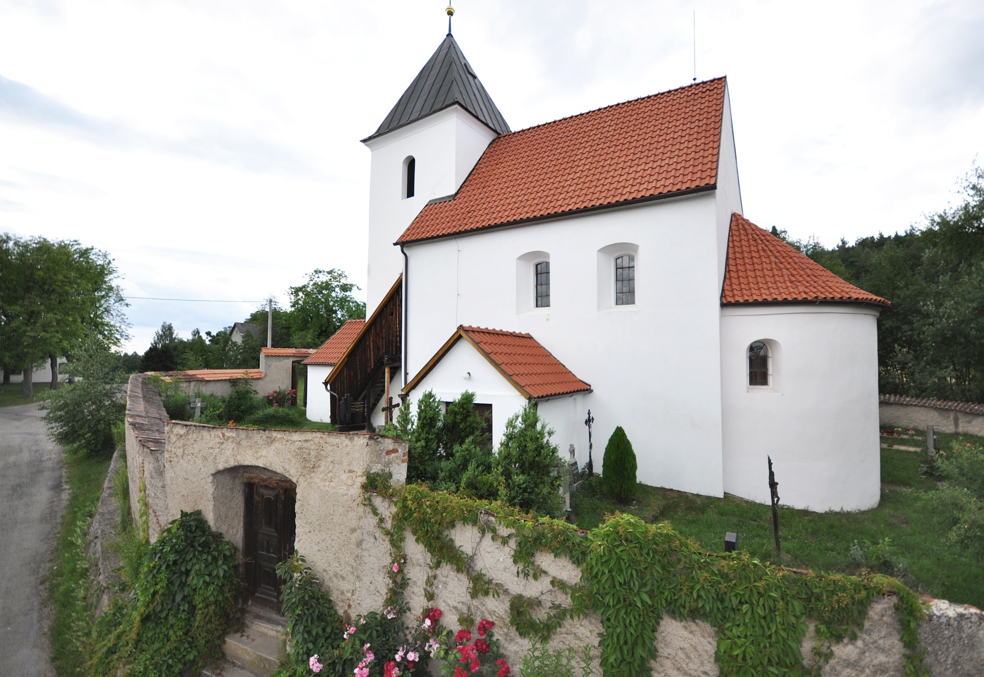 Kostel sv. Martina (Tožice)